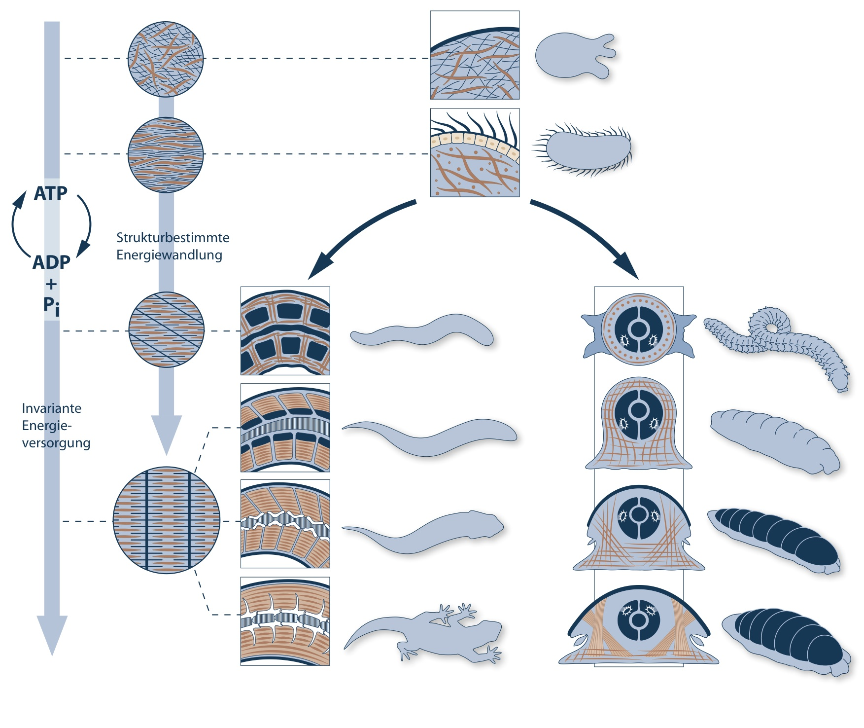 Optimierung und Differenzierung in der Evolution Namensnennung: Manfred Grasshoff, Michael Gudo, Tareq Syed